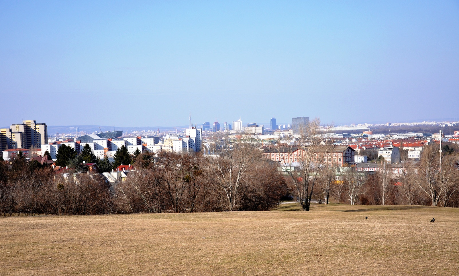 2012 Wien 0085